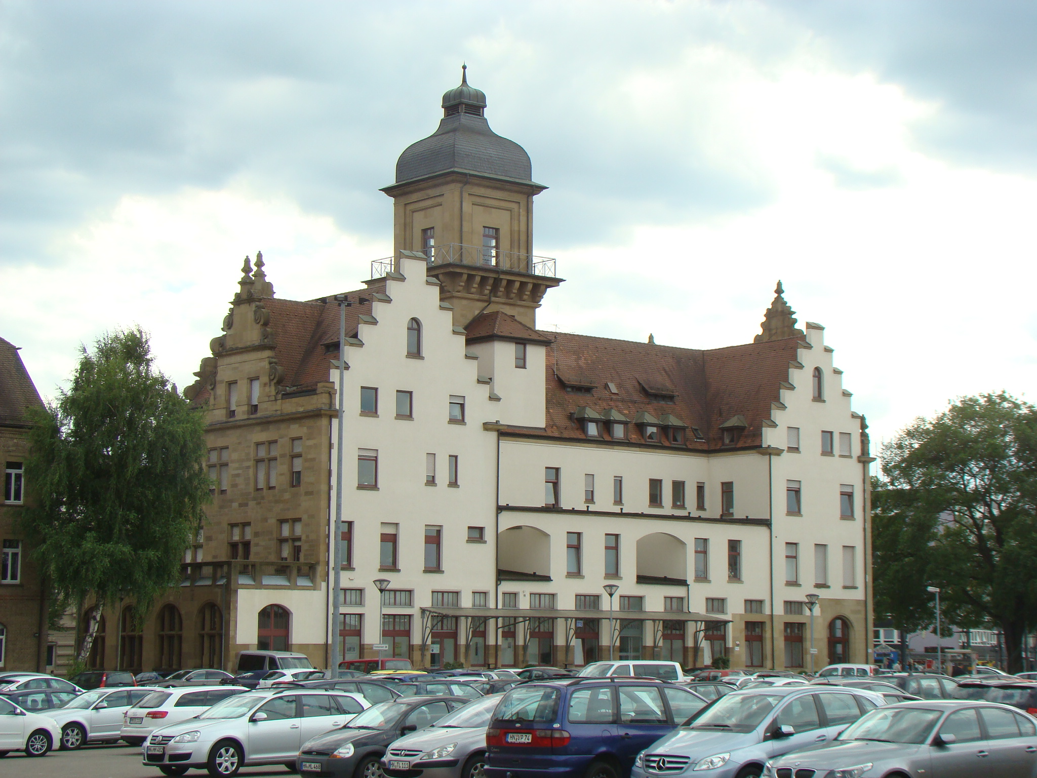 Postamt am Bahnhof (Heilbronn)